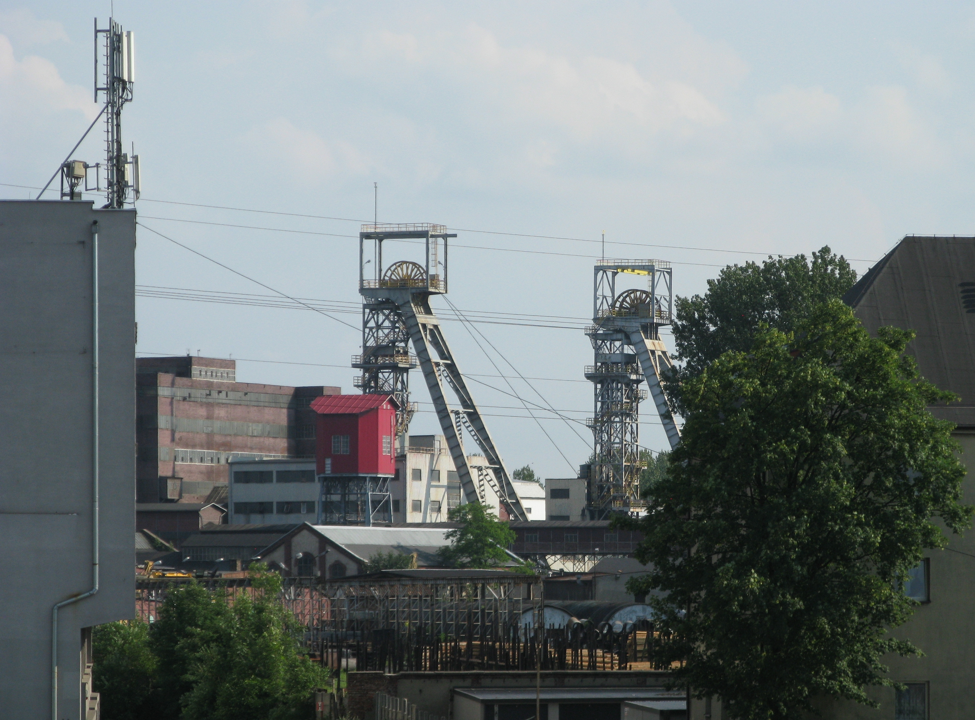 Kopalnia węgla kamiennego Bobrek-Piekary ruch Bobrek w Bytomiu-Karbiu.